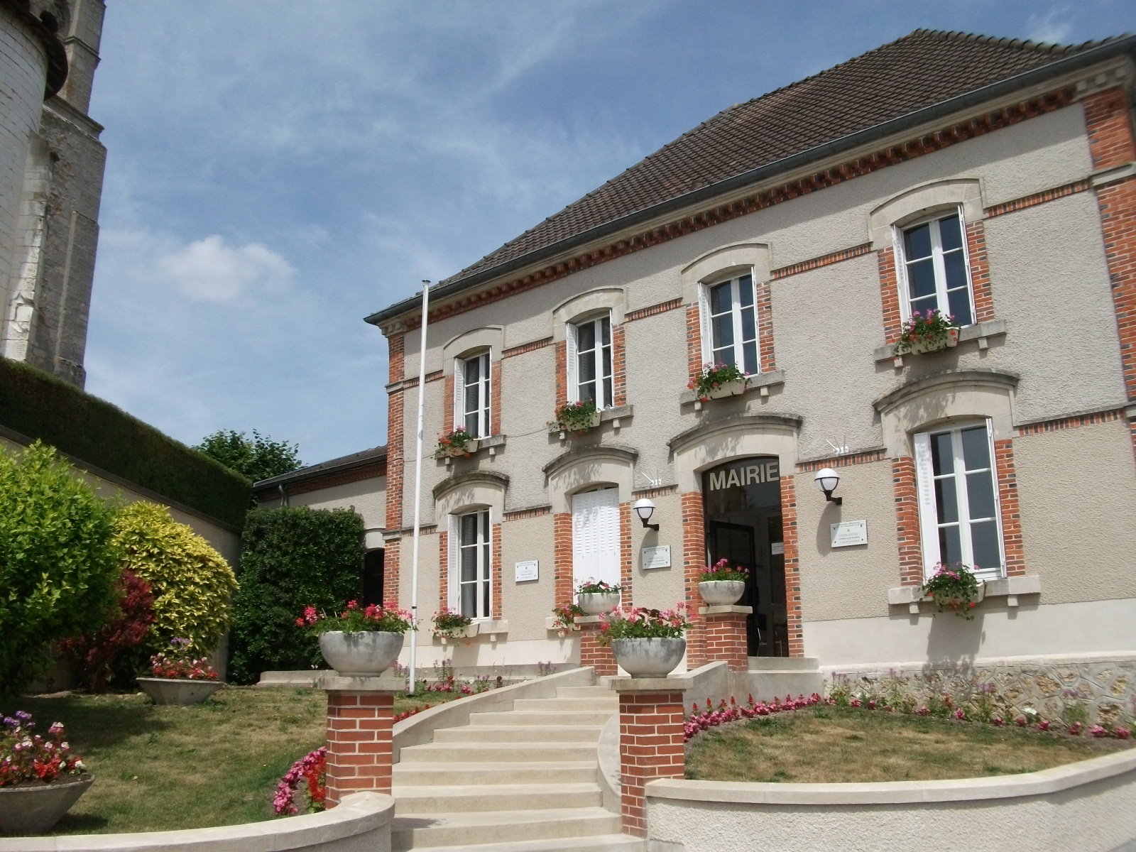 vue de la Mairie COndé-sur-Marne et d'une partie de l'égliser.